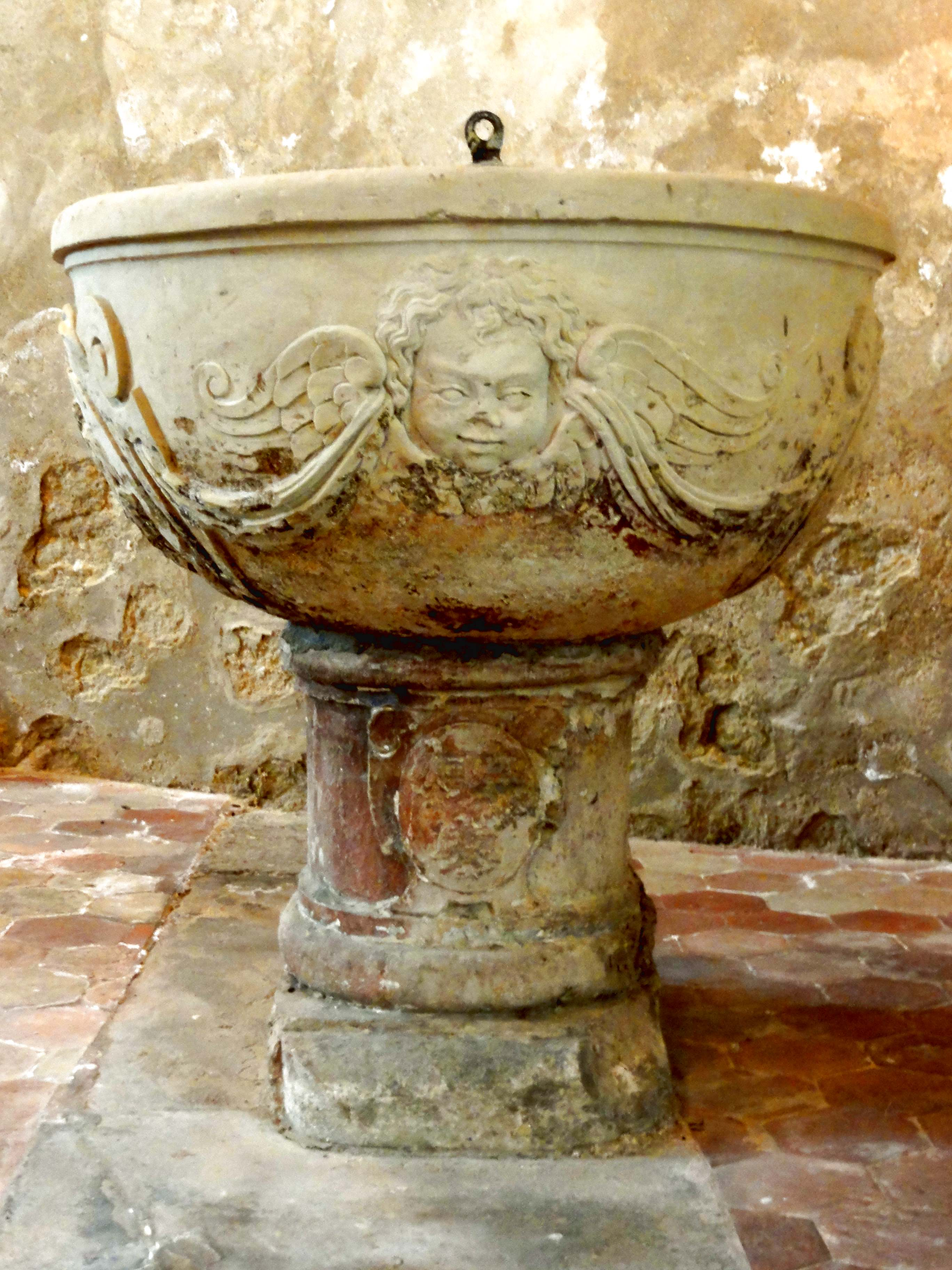 Mobilier de l'église - voir titre.